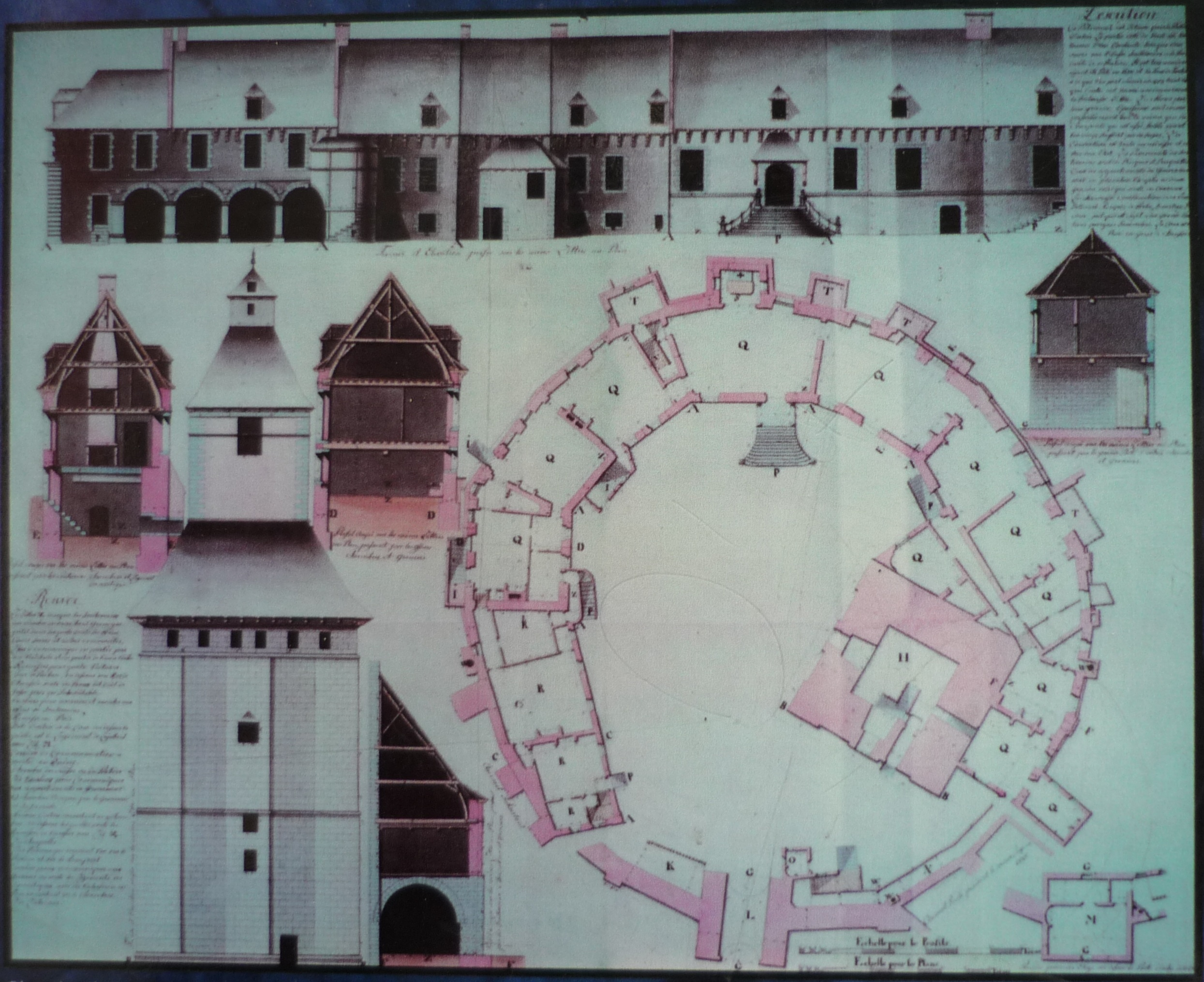 Plan du château au XVIII siècle